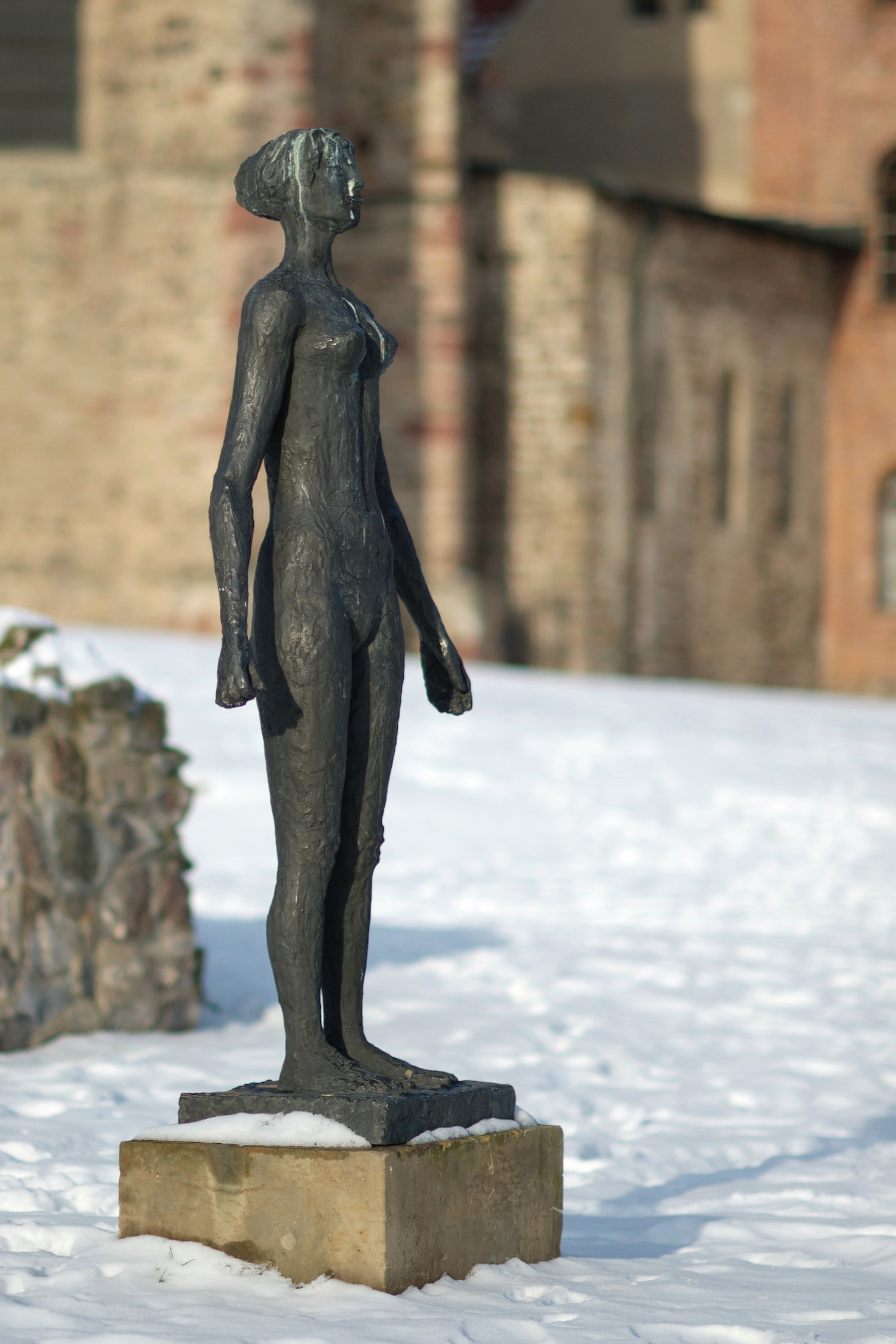 Wikipedia im Landtag – Sachsen-Anhalt 13./14. Dezember 2012 in MagdeburgDieses Foto wurde im Rahmen des Projektes „Wikipedia im Landtag“ erstellt. The making of this document was supported by the Community-Budget of Wikimedia Germany. The making of this work was supported by Wikimedia Austria. For other files made with the support of Wikimedia Austria, please see the category Supported by Wikimedia Österreich.